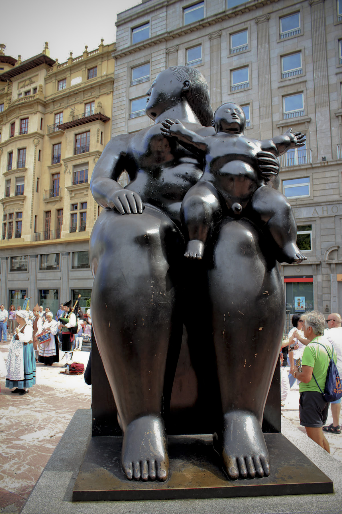 Oviedo. Asturias